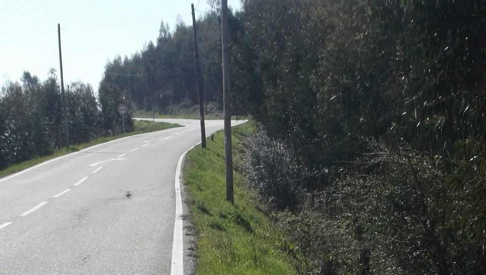 troço vale da ursa - ferreira zezere